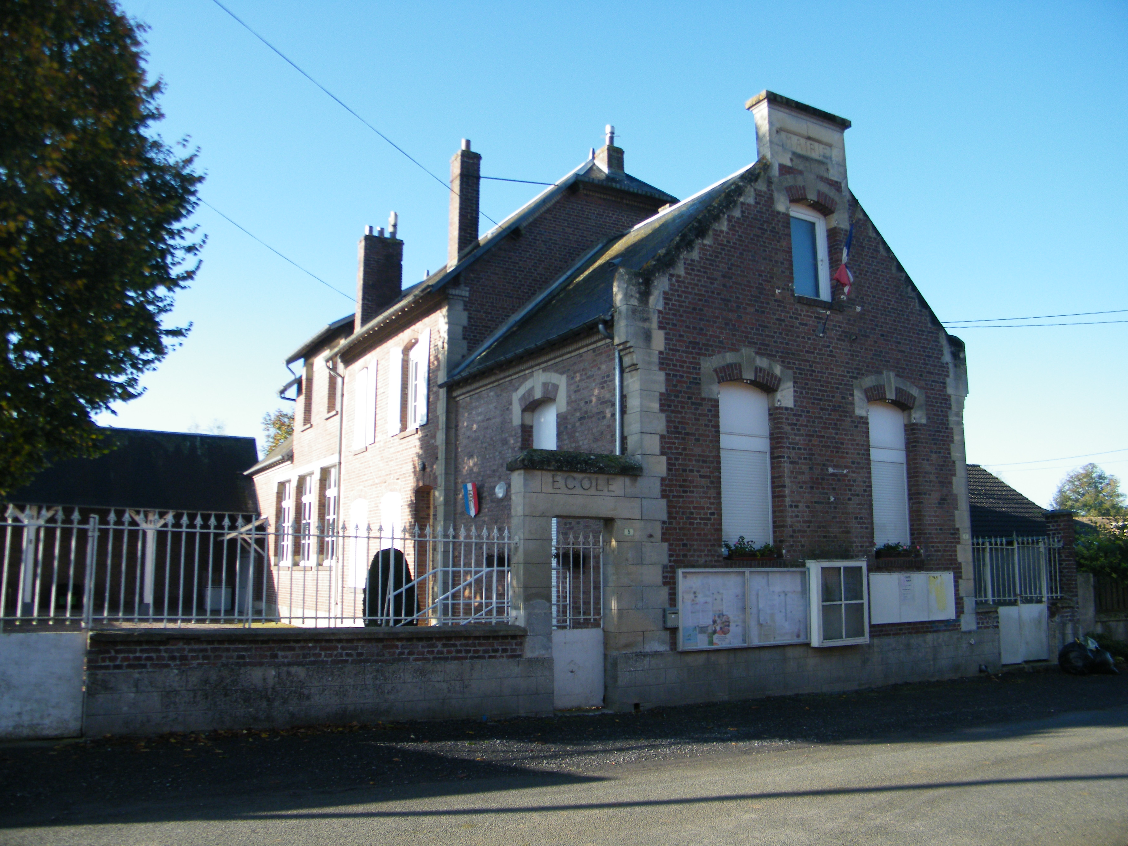 Bâtiments communaux.